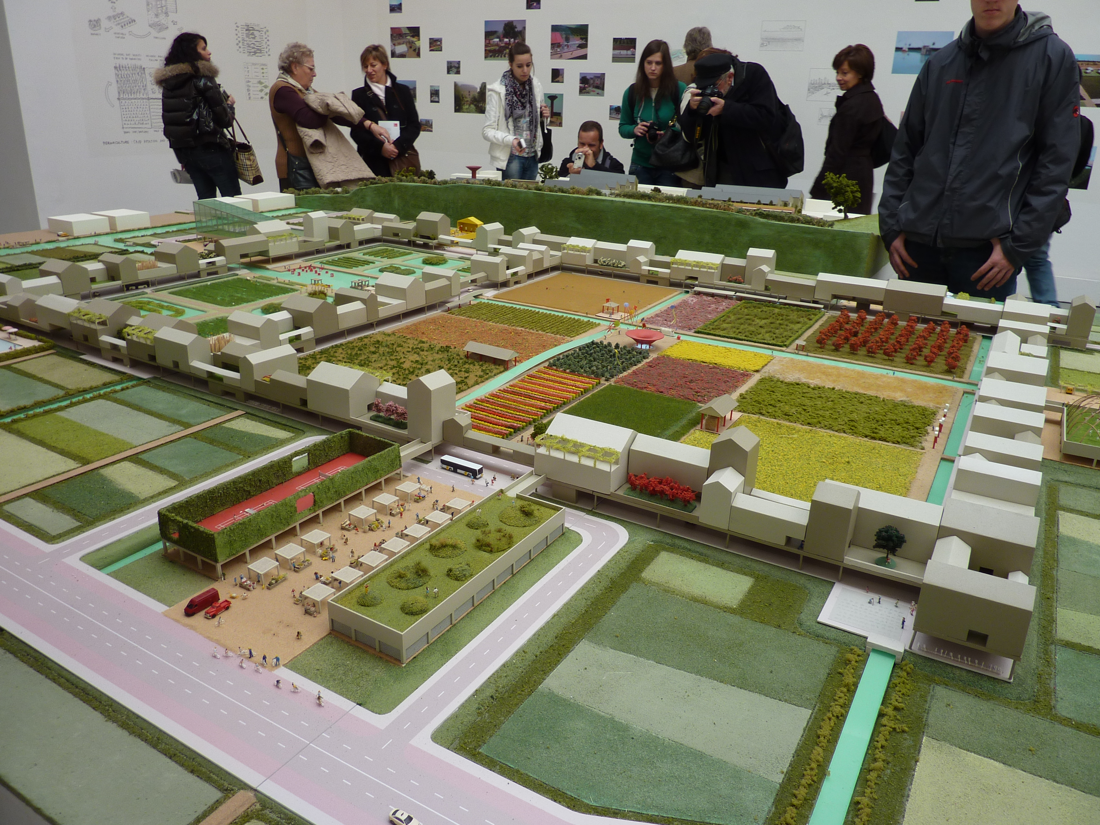 Travail proposé par Aldo Cibic lors de la Biennale de Venise en 2011